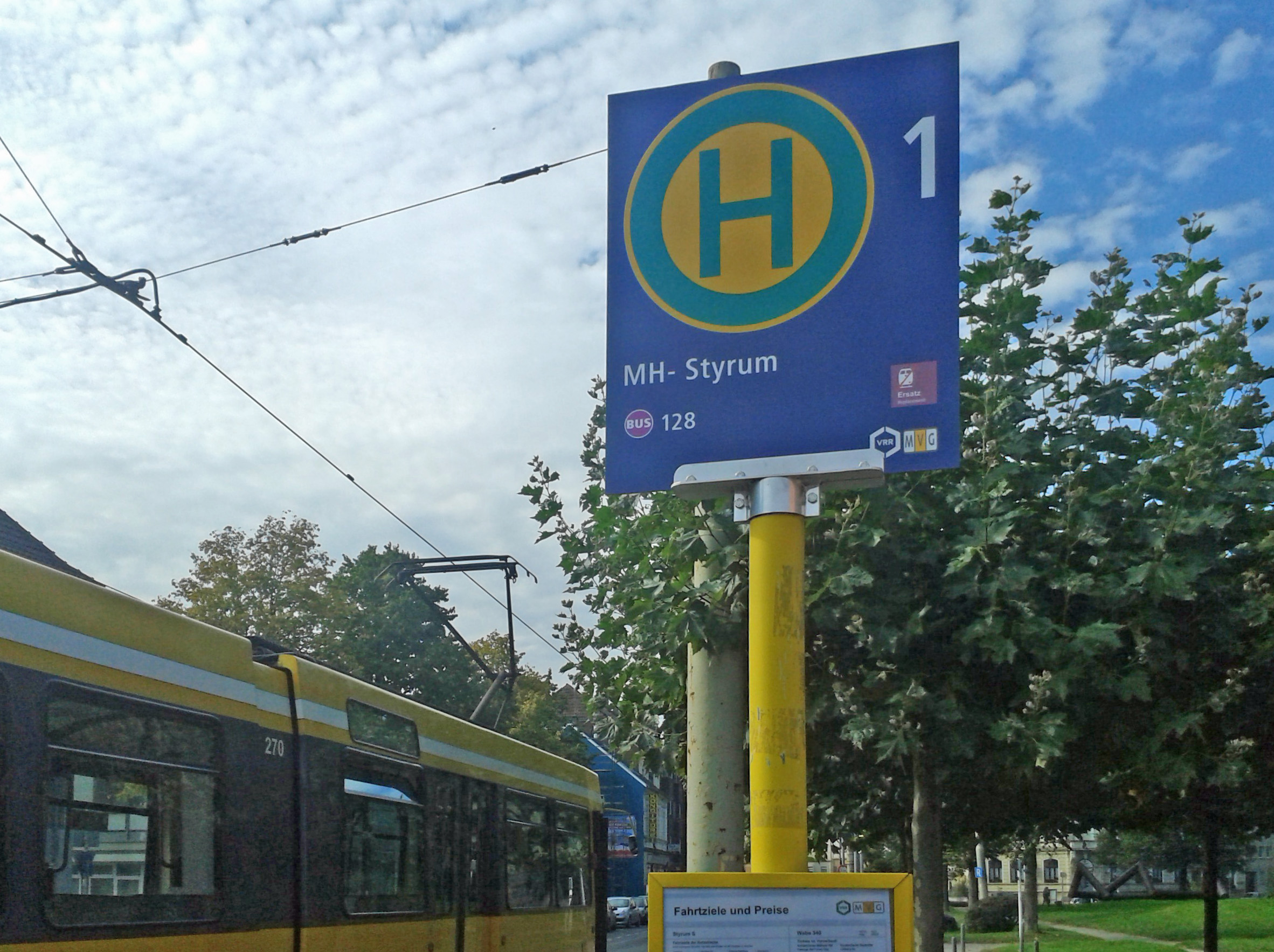 Am Styrumer Bahnhof hält der M8S 270 am letzten Betriebstag der Straßenbahnlinie an der Haltestelle, die bereits als ausschließliche Bushaltestelle ausgewiesen ist.